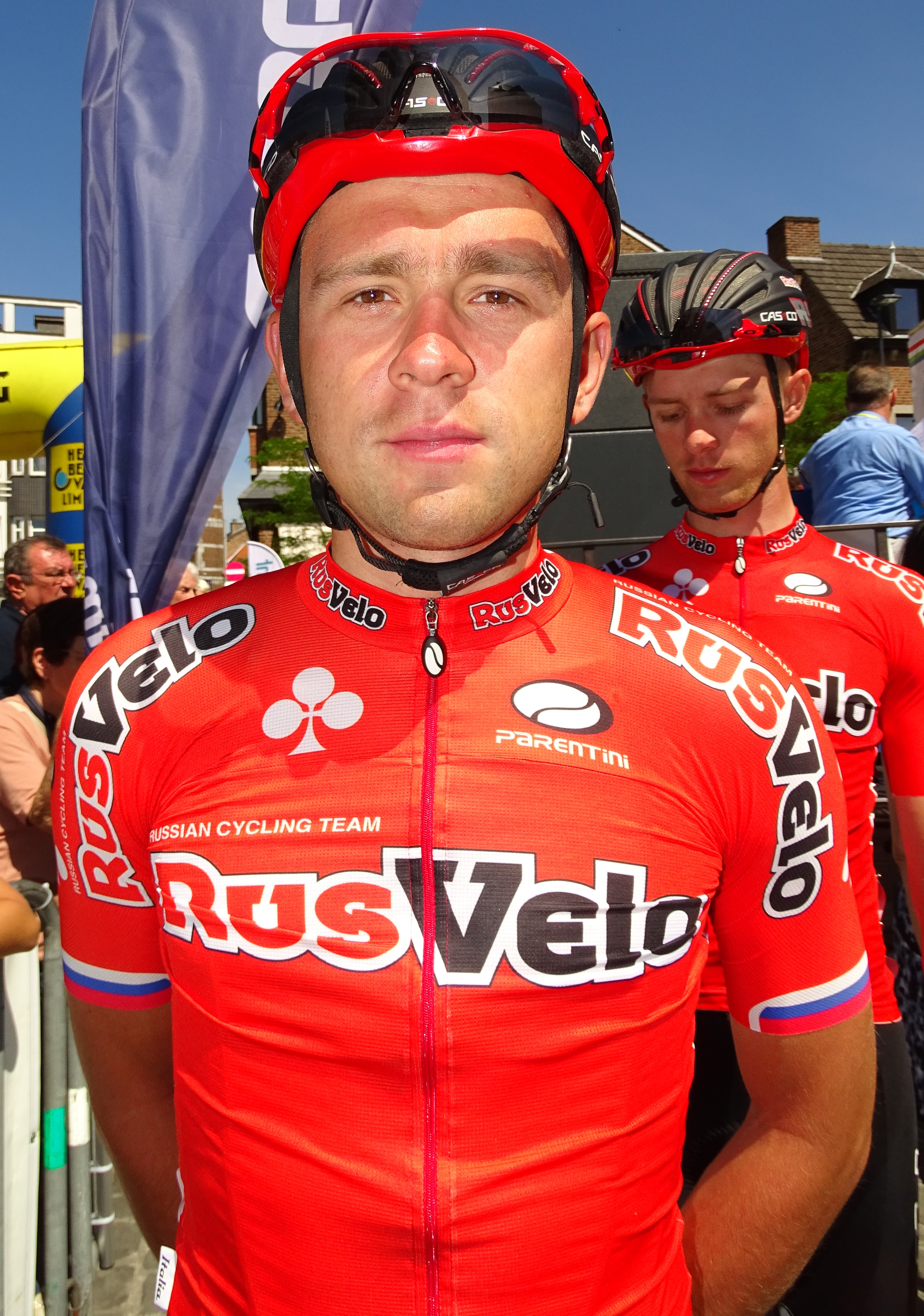 Reportage réalisé le dimanche 14 juin à l'occasion du départ et de l'arrivée du Tour du Limbourg 2015 à Tongres, Belgique.